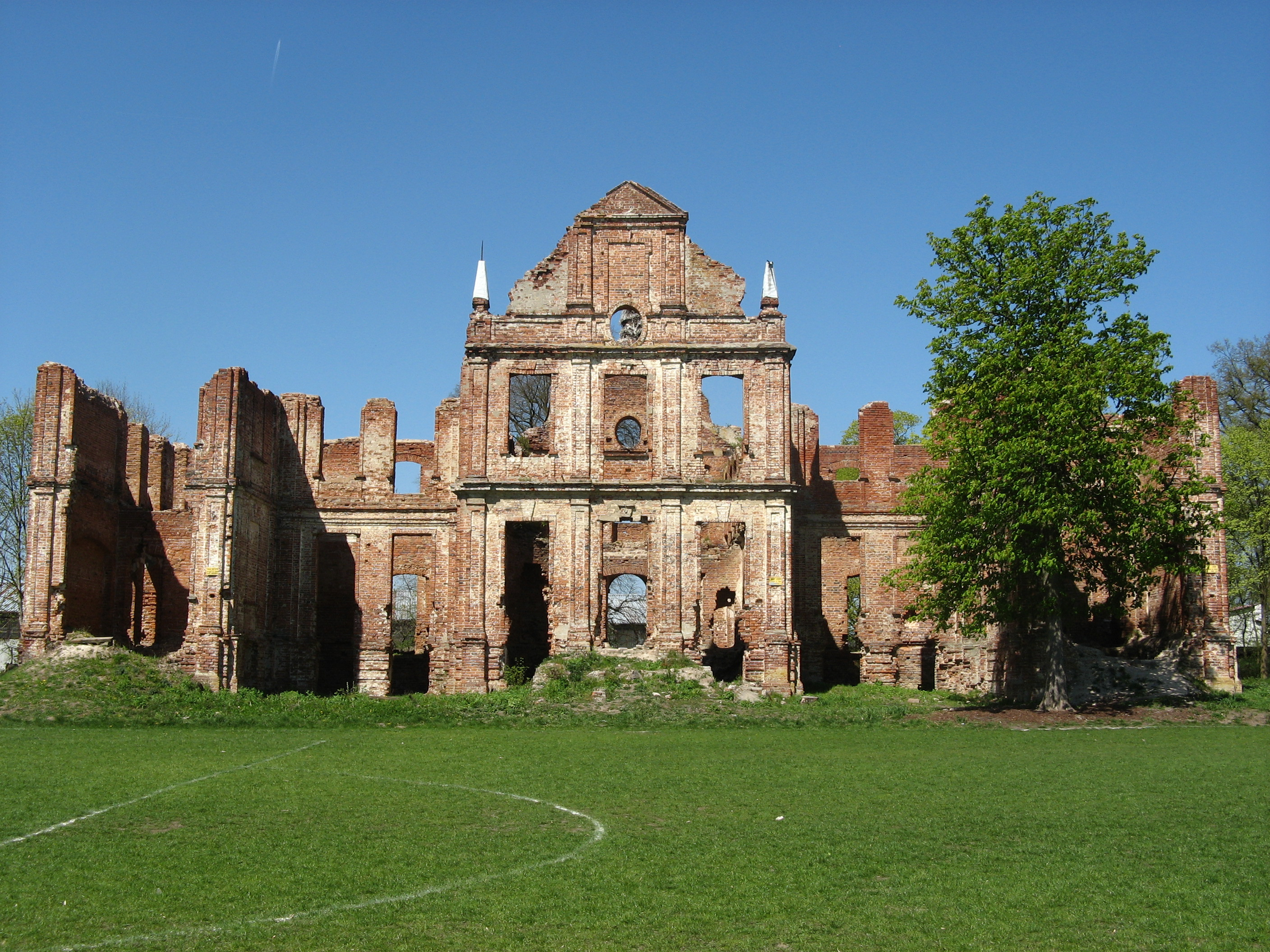 Ruiny pałacu Golców w Kłębowcu